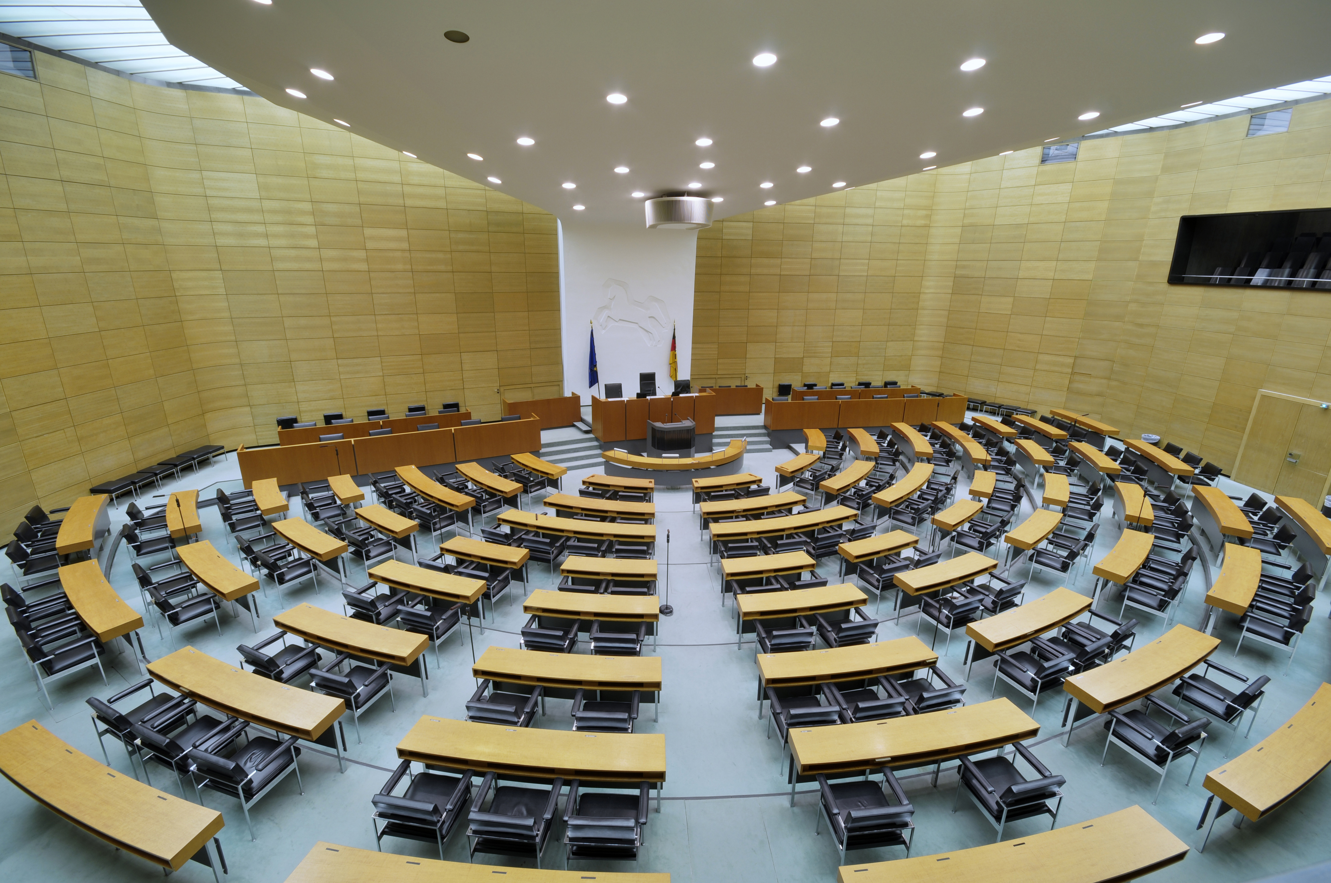 Landtag Niedersachsen, Hannover Wikipedia im Landtag – Niedersachsen 19. März 2013 in HannoverDieses Bild entstand während eines Fototermins im Niedersächsischen Landtagsgebäude in Hannover vor dem geplanten Abriß und Neubau bis 2017. Die Landtagsverwaltung hat uns gestattet, alle Räume zu dokumentieren.